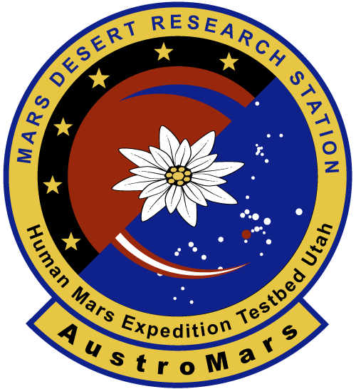 AustroMars Missions Patch